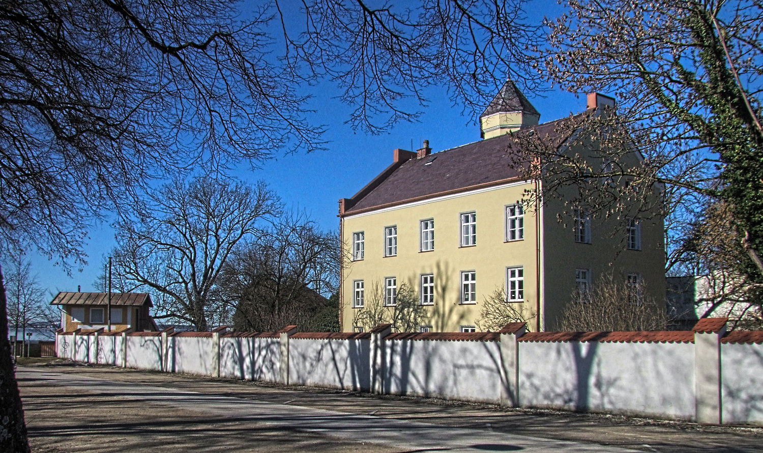 Schloss Neuenchieming in Chieming, Markstatt 6, ehemaliger Pfarrhof von 1642 - 1965